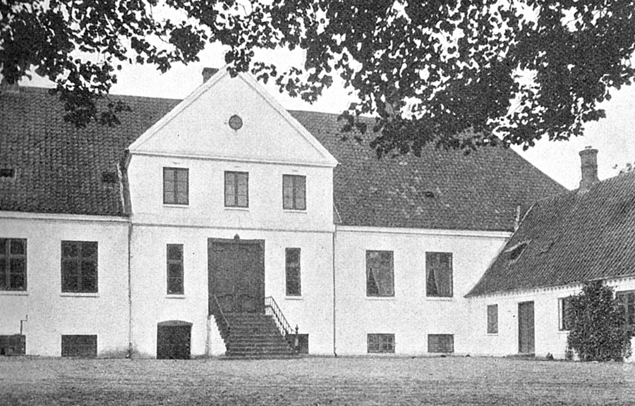 Ørritslevgård er en lille herregård, som nævnes første gang i 1580. Gården ligger i Otterup Sogn, Lunde Herred, Otterup Kommune. Hovedbygningen er opført i 1789.